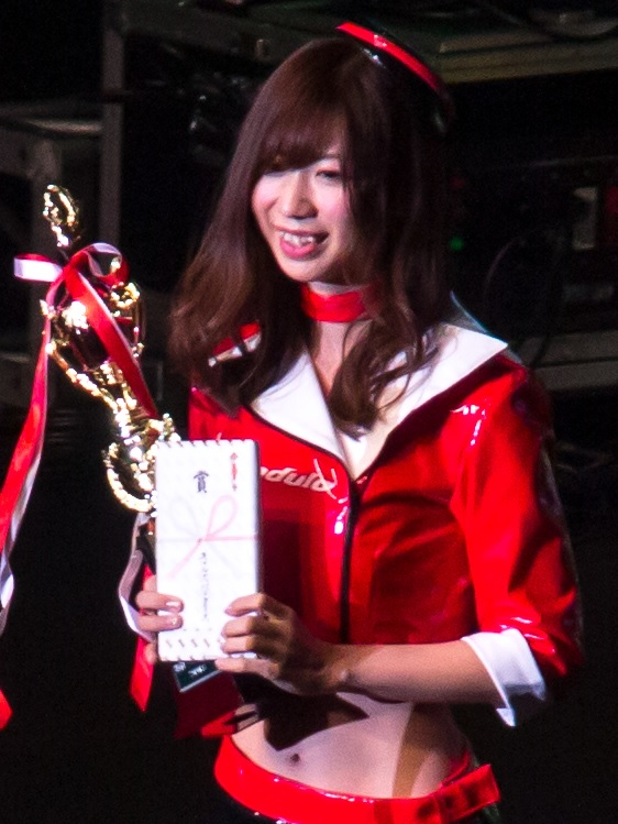 日本レースクイーン大賞2018 生田ちむ